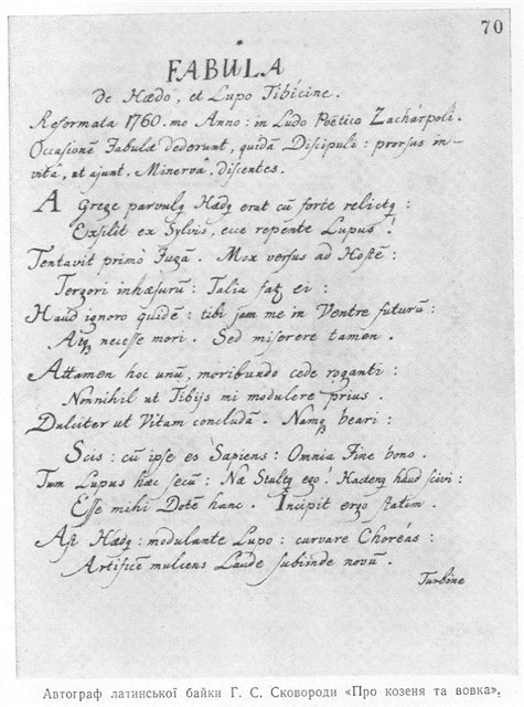 Копия рукописи Григория Саввича Сковороды